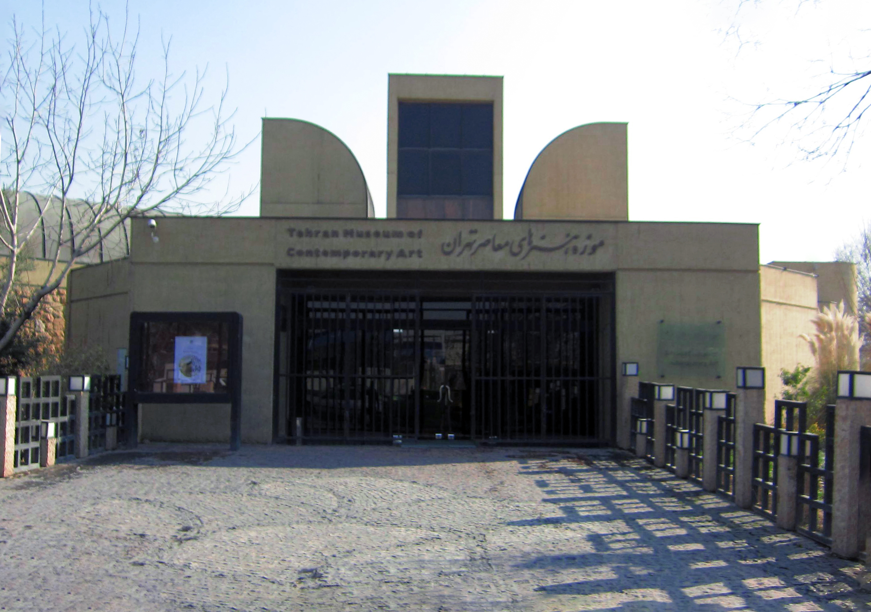 Tehran Museum of Contemporary Art. Edit by Gnosis